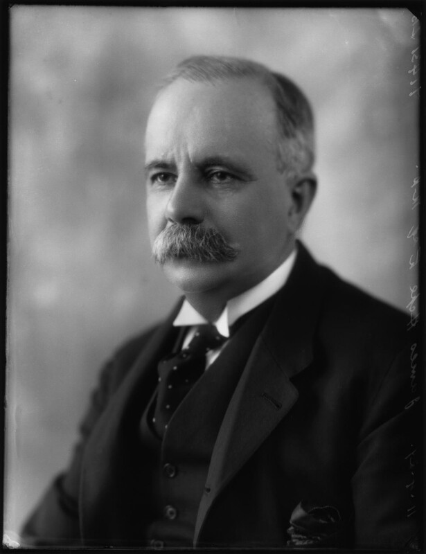 Lord Rankeillour